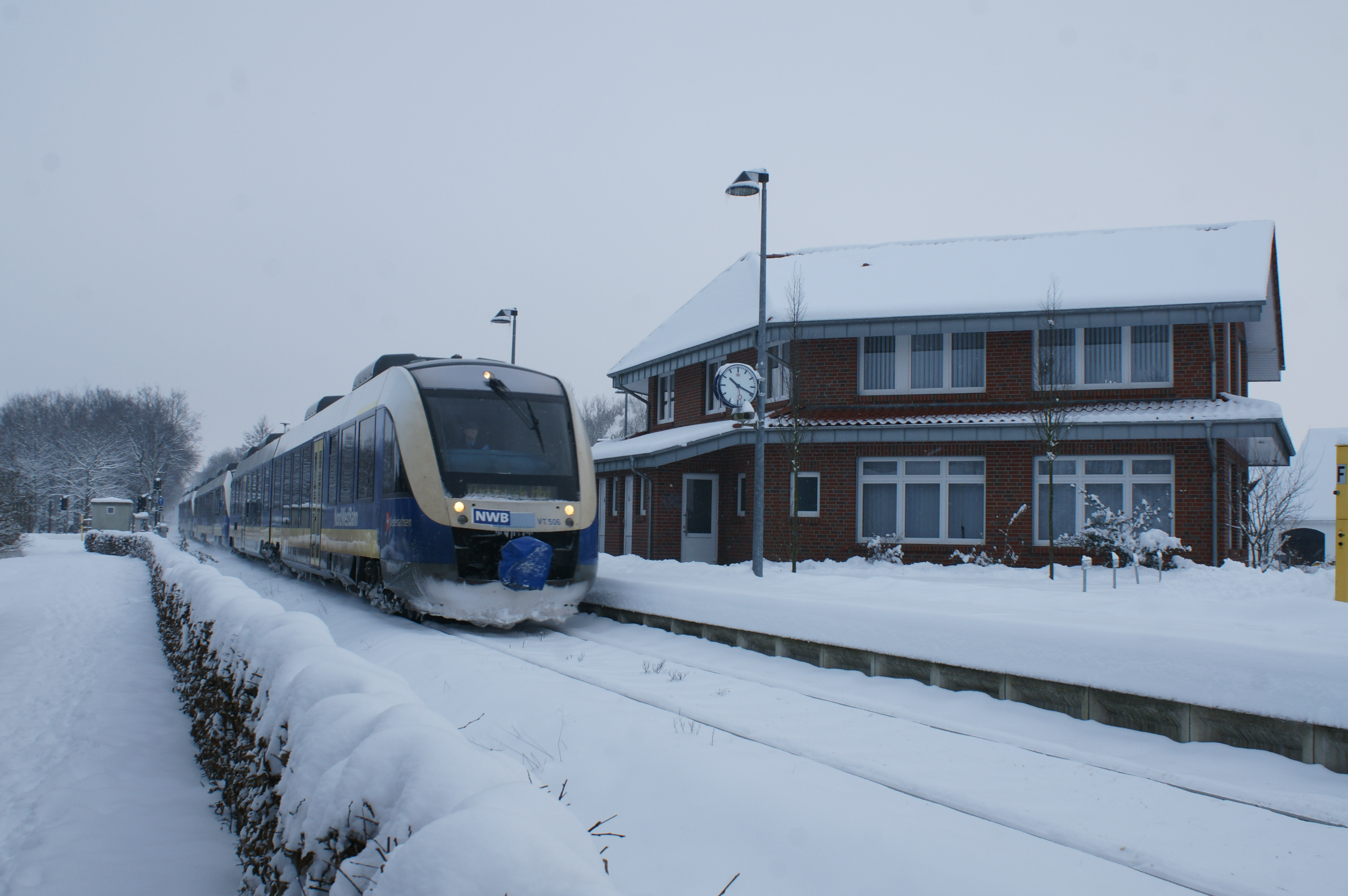 Bahnbhalt Rieste im Jahr 2010